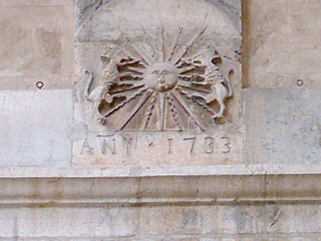 Escut de Sóller, era a l'edifici antic de l'ajuntament i actualment és a una porta lateral. Autor: Plàcid Pérez Bru. Template:DP-usuari